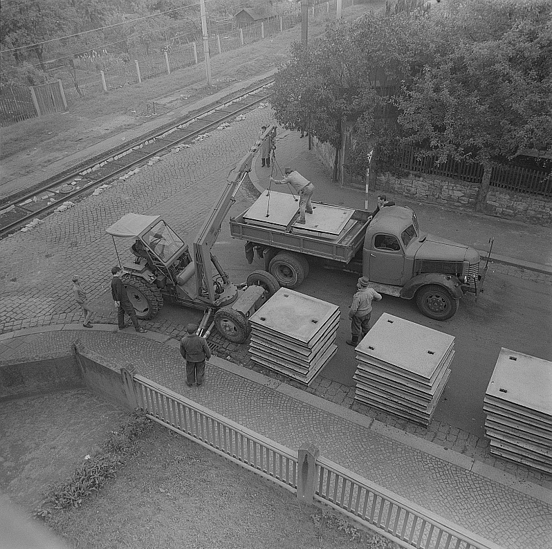 Original image description from the Deutsche FotothekDresden-Leutewitz. Straßenbahngleisbau in der Warthaer Straße, Gleisplatten werden mit Mobildrehkran vom LKW entladen und gestapelt